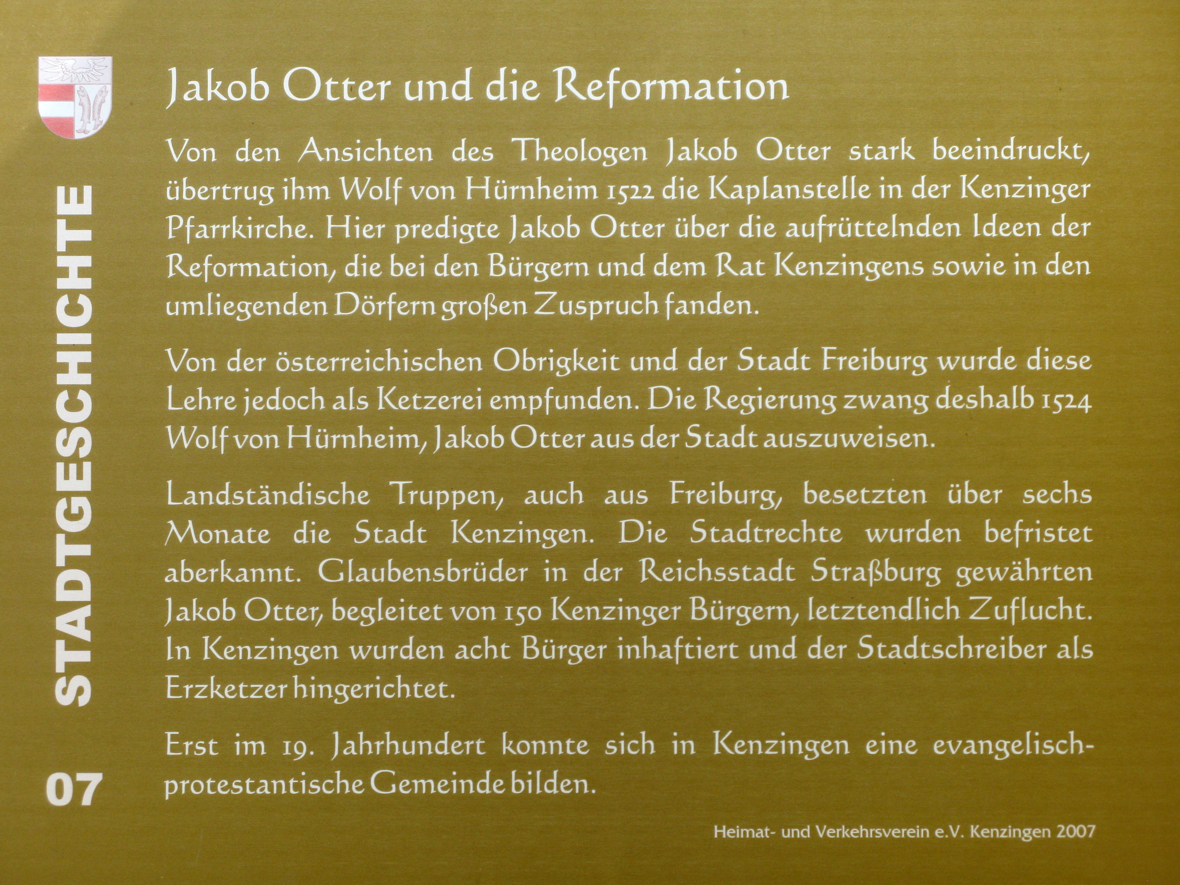 Jakob Otter und die Reformation, Tafel